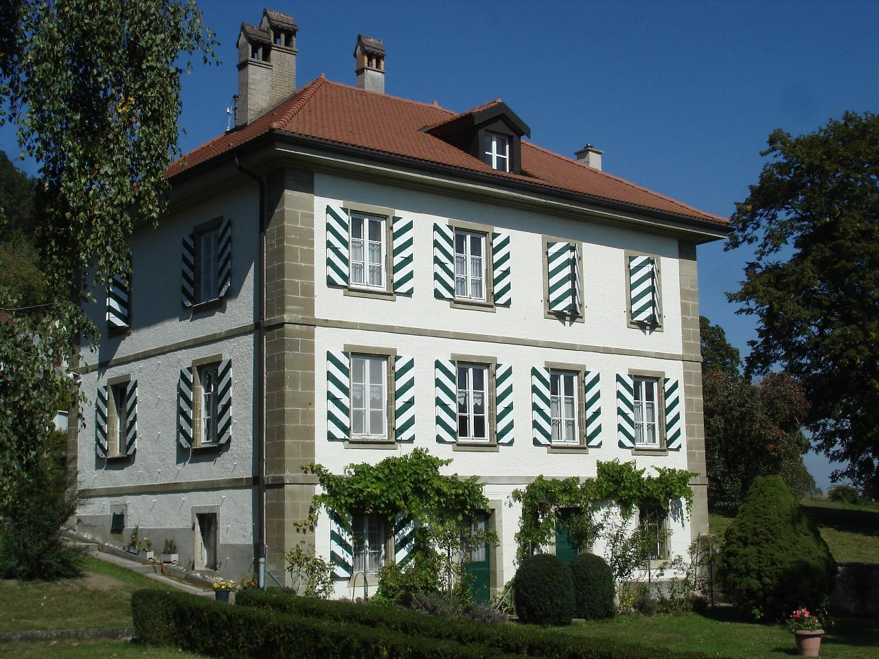 Villa in Villeneuve (FR) im September 2010.